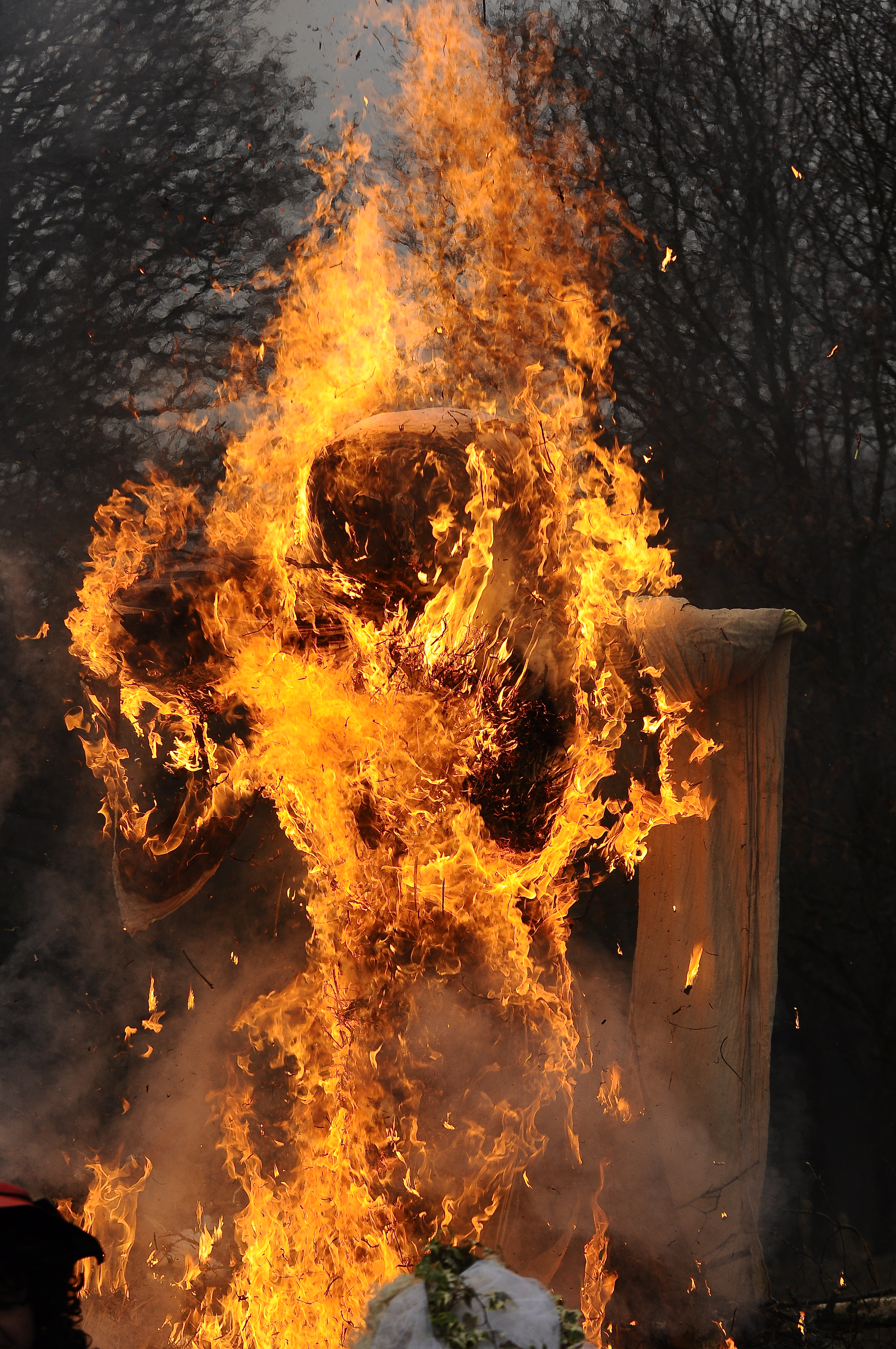 Uzgavenes Lietuviu sodyboj 2010